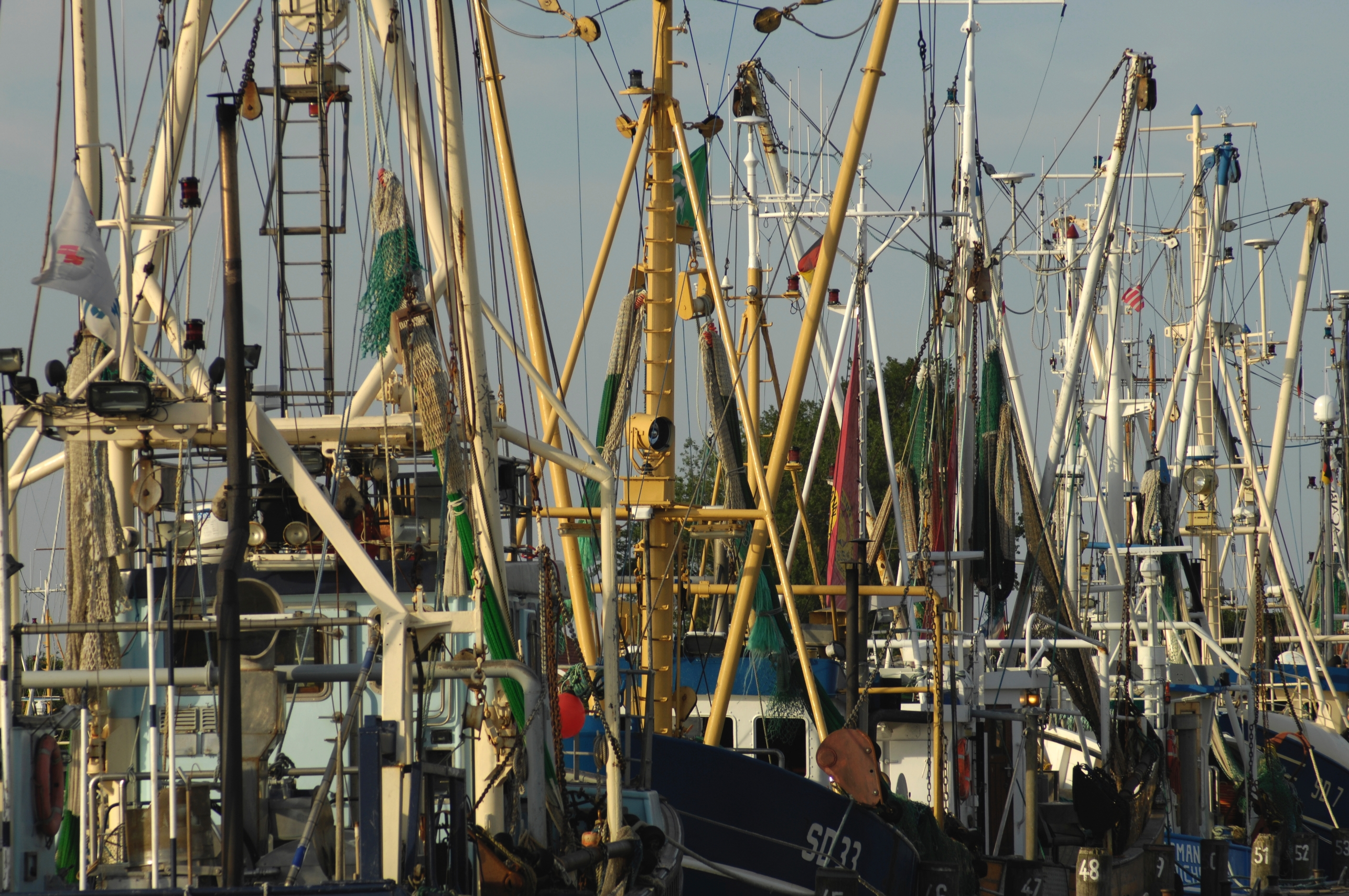 Büsum,Fischerboote im Hafen